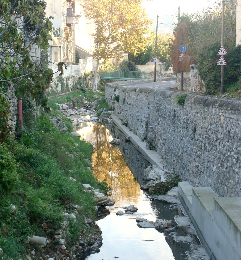 Le ruisseau des Aygalades le long du chemin de Saint-Antoine à Saint-Joseph.